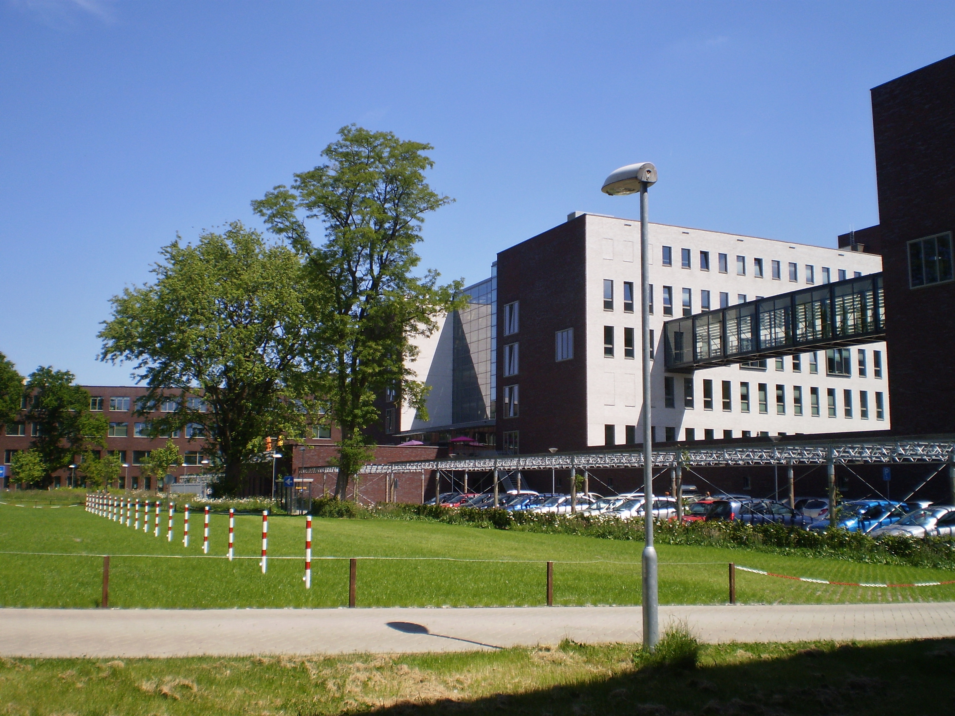 Meander MC noordzijde